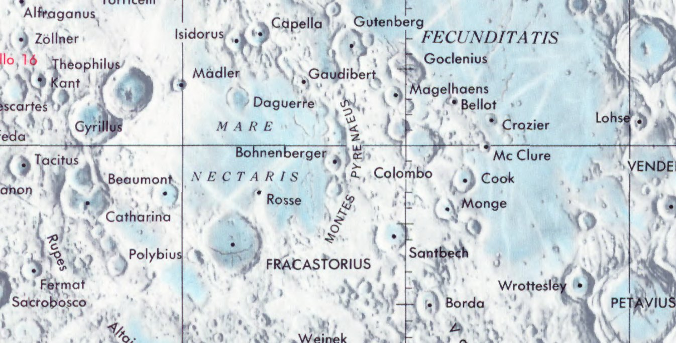 Cráter lunar Bohnenberger. Localización. (Lunar Chart LPC1. Second Edition)